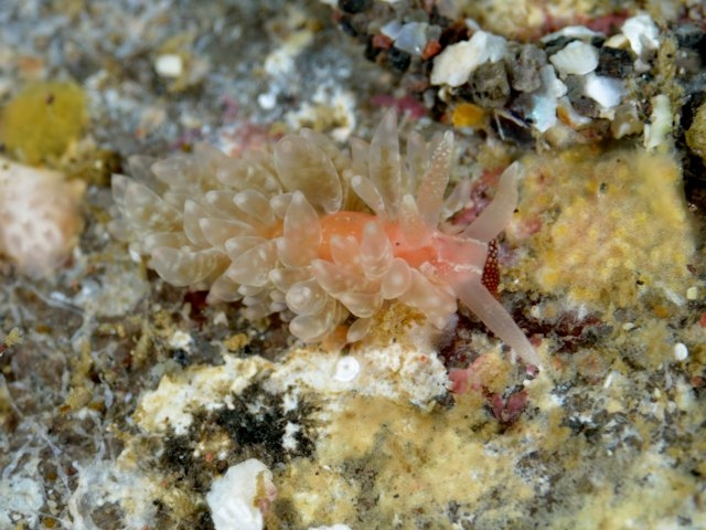 Baeolidia salaamica, Osezaki, Japón